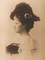 графиня Климентина Тишкевич (1856-1921): фото